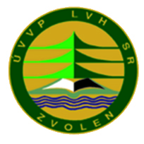 Logo ÚVVPLVH SR